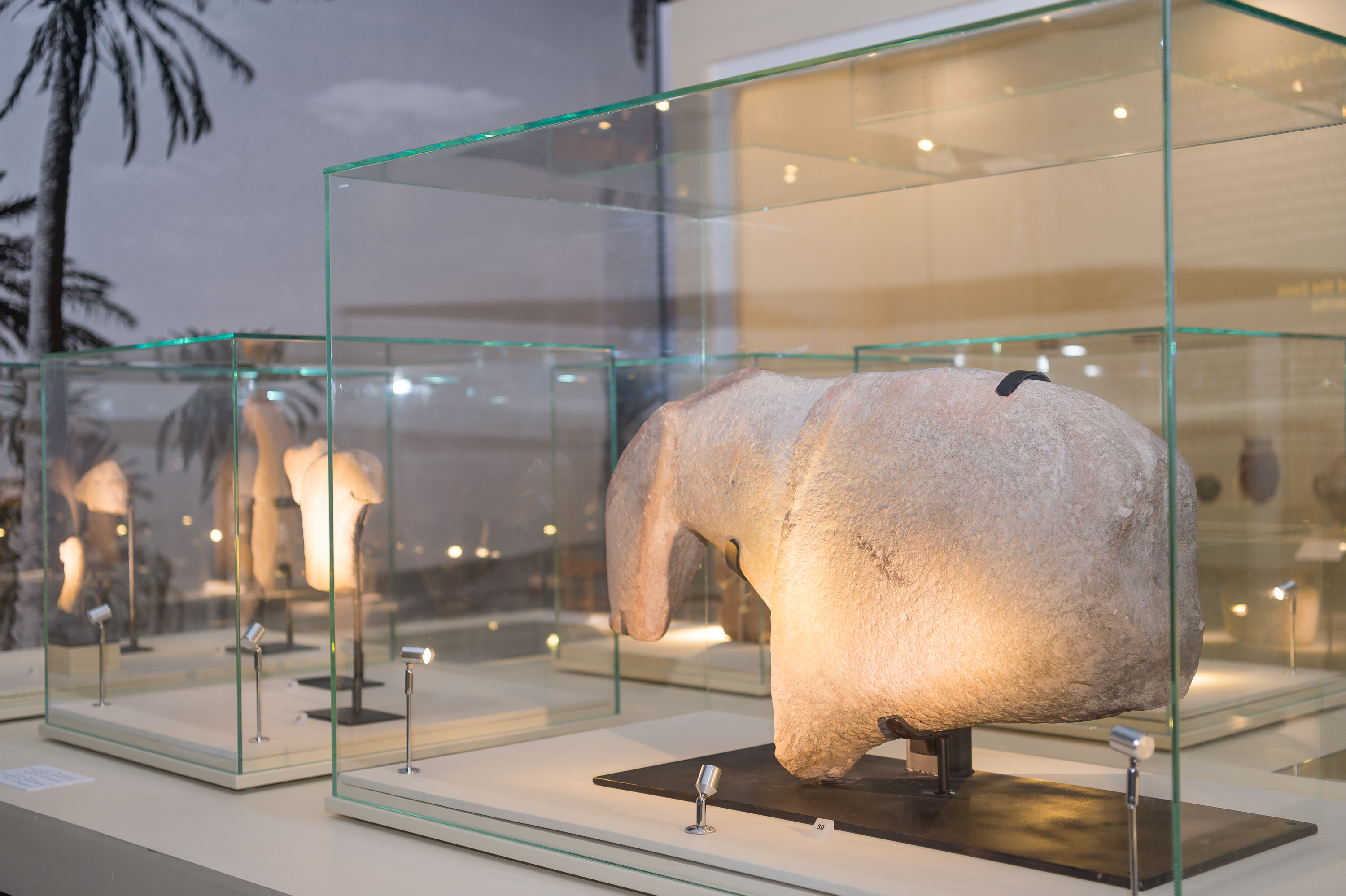 عثر علماء الاثار في الموقع على آثار متحجرة لعدد من الحيوانات